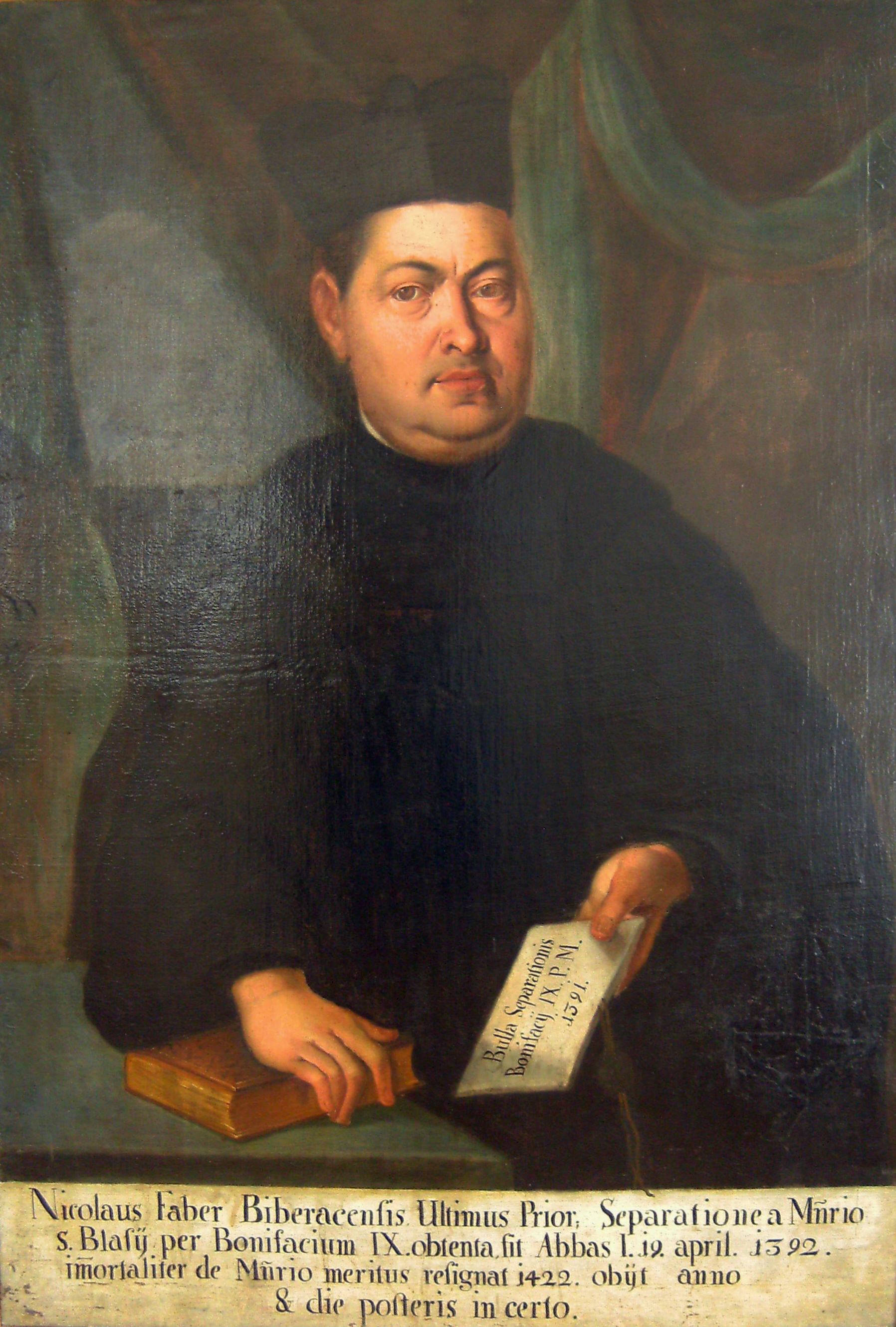 Nikolaus Faber - 1. Abt Kloster Ochsenhausen